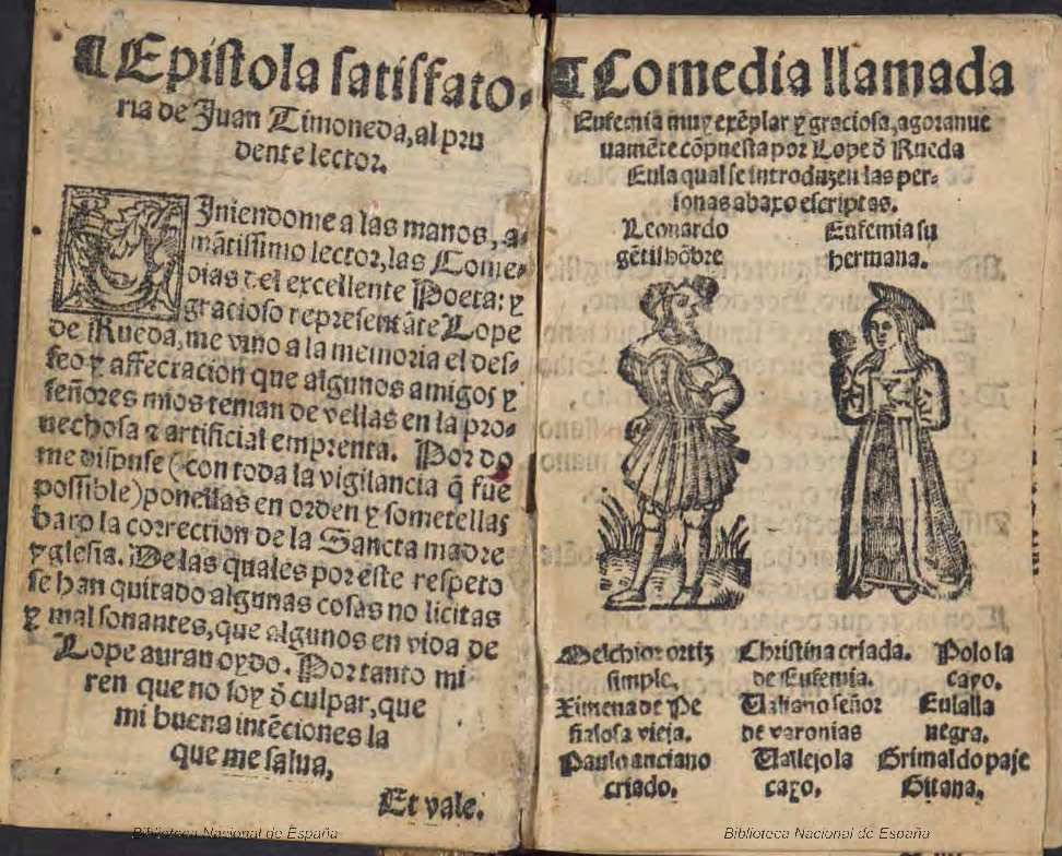 Las primeras dos elegantes y graciosas comedias del excelle[n]te Poeta y representa[n]te lope de rueda sacadas a luz por jua[n] timoneda. Comedia Eufemia. Comedia Armelina. [Las segu[n]das dos Comedias del excellente poeta, y representante Lope de rueda agora nueuamente sacadas a luz por jua[n] Timoneda. Comedia d[e]los engaños. Comedia Medora. Los colloquios pastoriles de muy agraciada y apazible prosa, co[m]puestos por el, excelente poeta y gracioso representa[n]te Lope d[e]Rueda, sacados a luz por Juan Timoneda. Colloquio de Camila. Colloquio de Tymbria] Autor: Rueda, Lope de (ca. 1505-1565) ; Timoneda, Juan de Fecha: 1576 Datos de edición: Seuilla En casa de Alonso de la Barrera